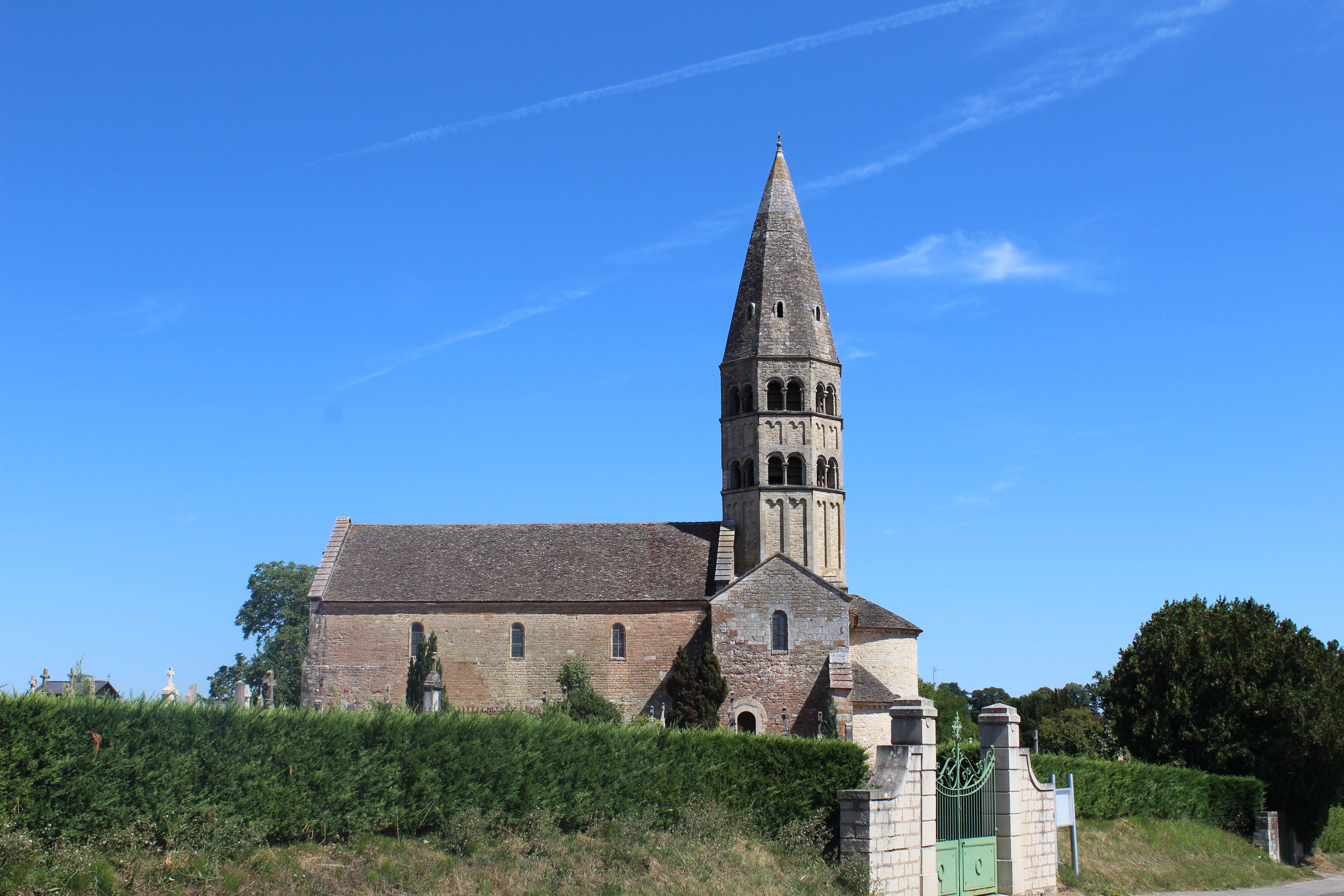 Église Saint-André de Saint-André-de-Bâgé